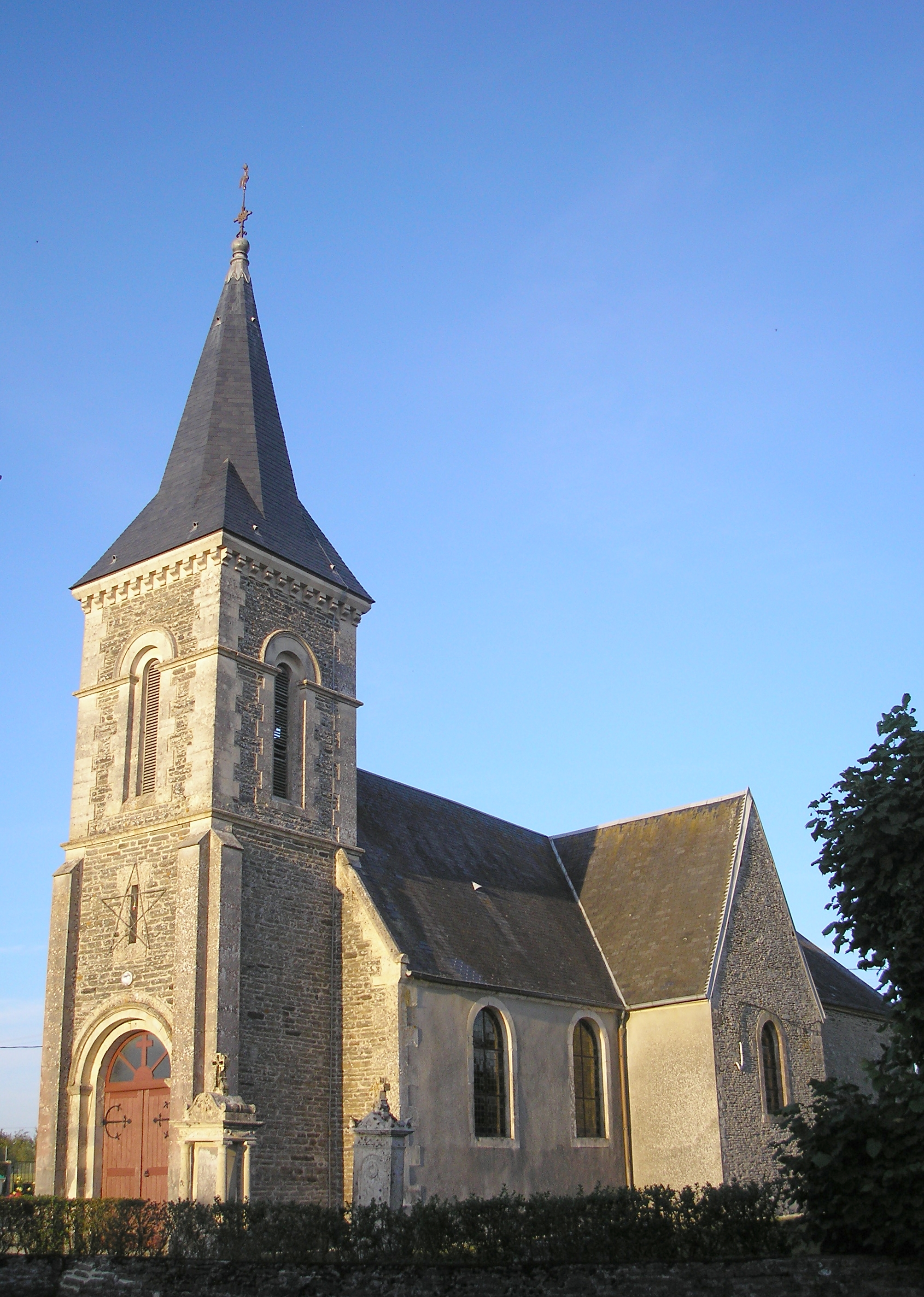 Tréprel (Normandie, France). L'église Saint-Aubin.